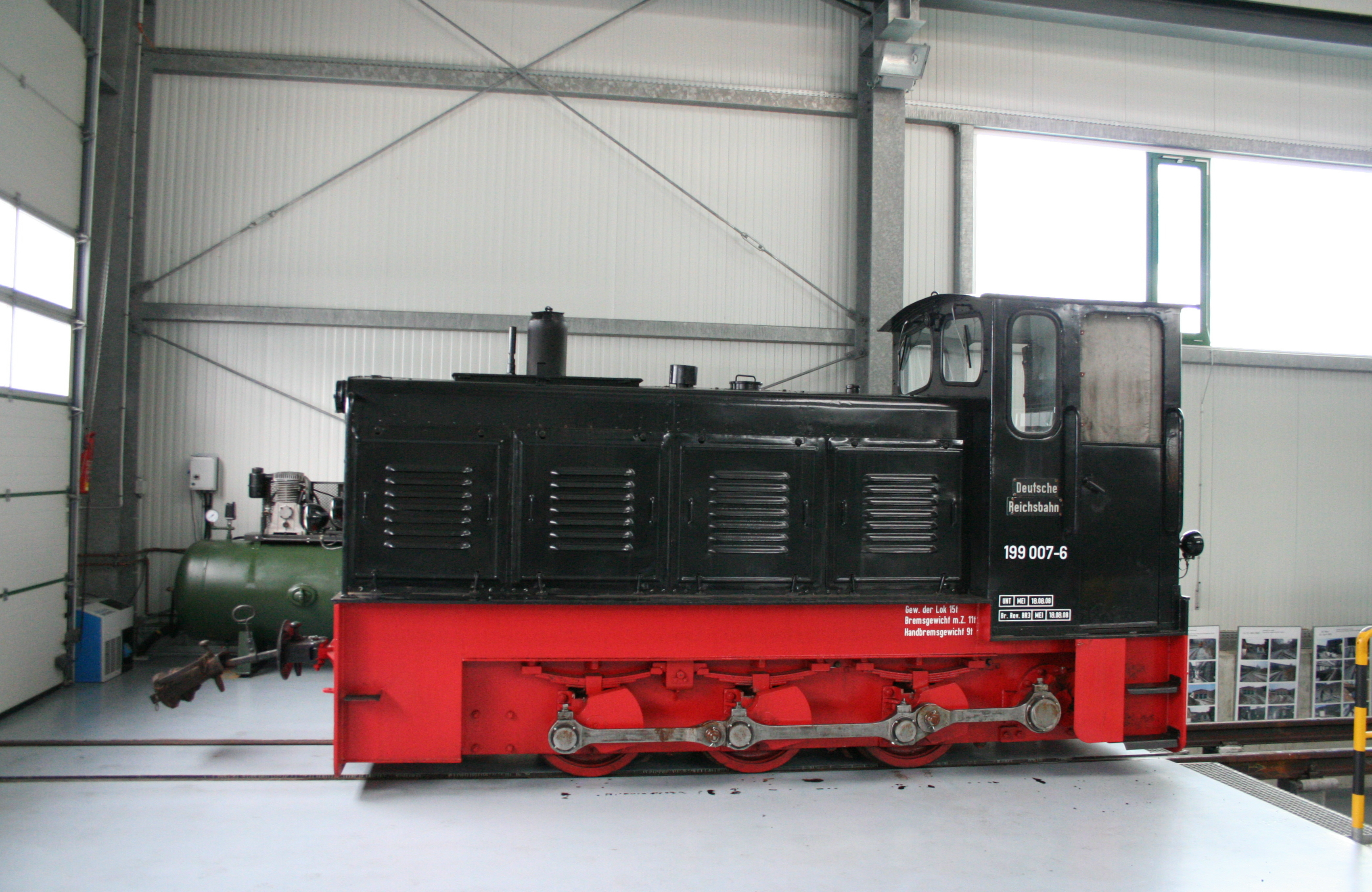 Diesellok 199 007 Typ Ns 4 in Jöhstadt 02.01.09